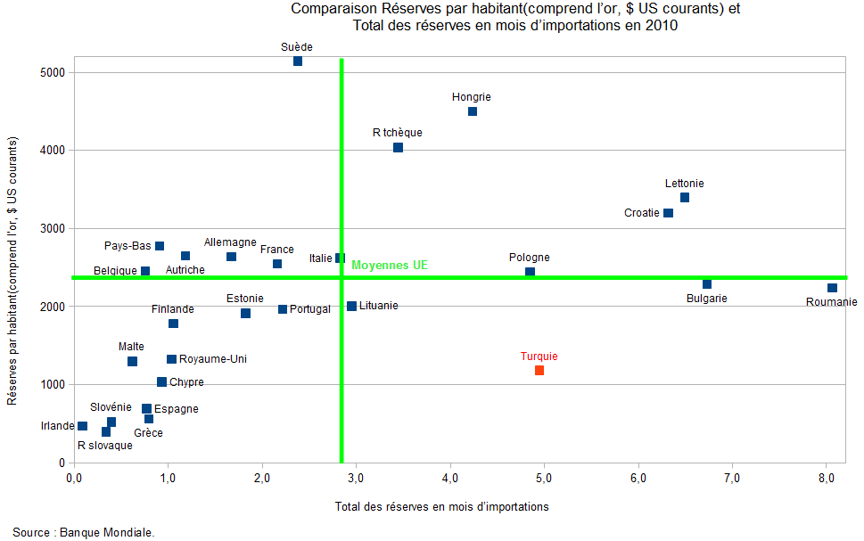 Comparaison du niveau des réserves de quelques pays européens - Source: Banque Mondiale